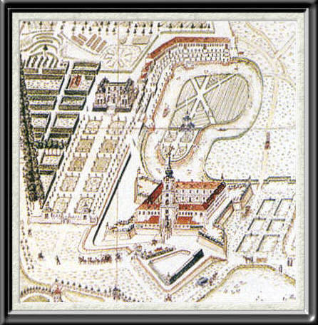 Zamek Lubomirskich wraz z otoczeniem. Fragment panormay Rzeszowa K.H. Wiedemanna z 1762 r. Widać zamek, Pałac Letni, jezioro z wyspą i pawilonem chińskim.